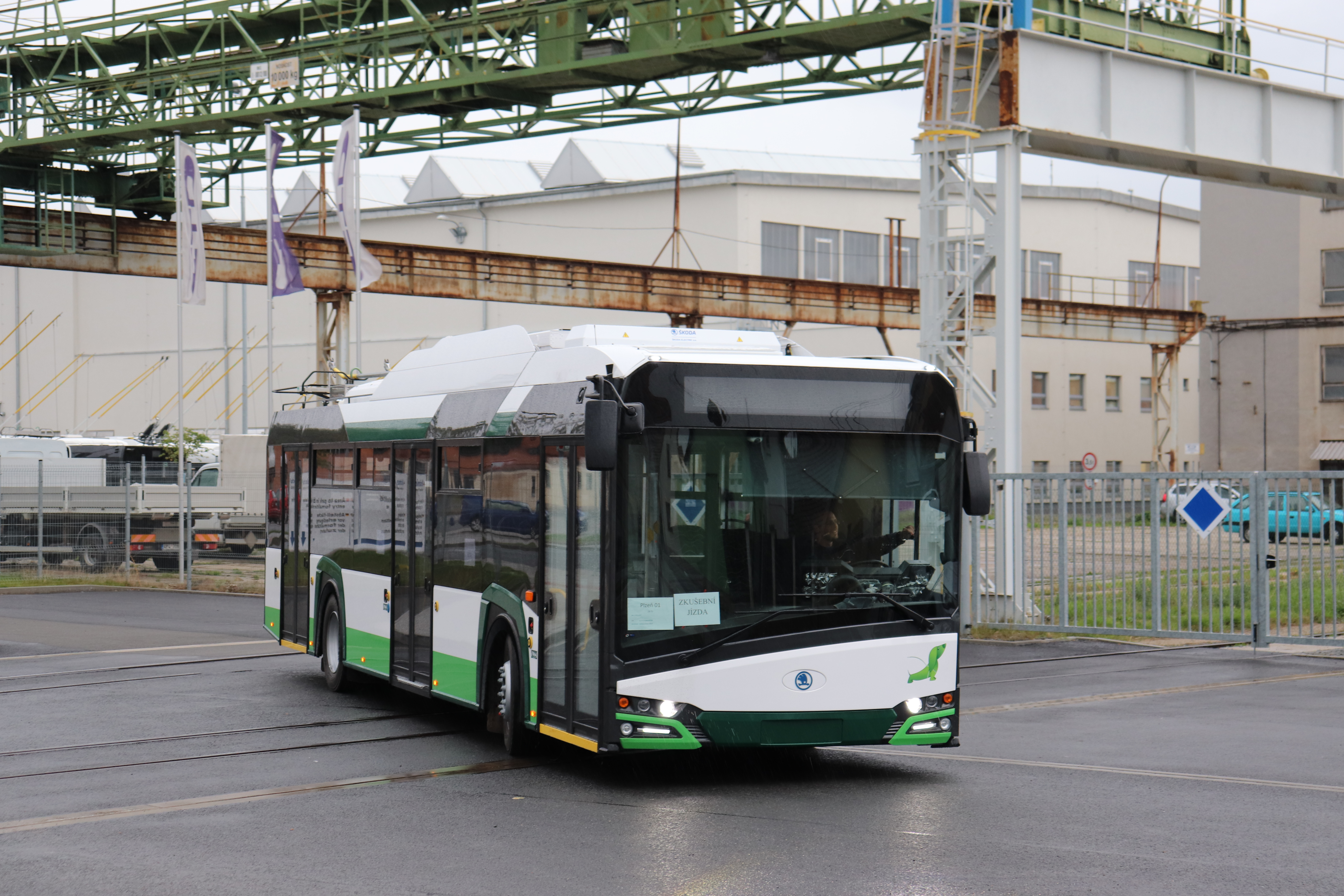 Zkušební jízda výrobce Škoda Electric.